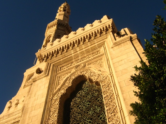 مسجد القائد ابراهيم بالاسكندرية